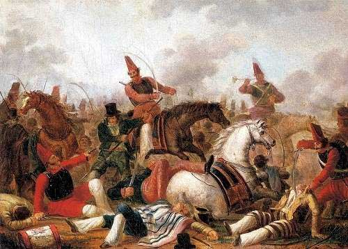 "Combate de caballería en la época de Rosas" (1830) Carlos Morel (1813-1894). Argentina. En el Museo Nacional de Bellas Artes, en Buenos Aires. Oleo sobre tela, 45 cm x 54 cm